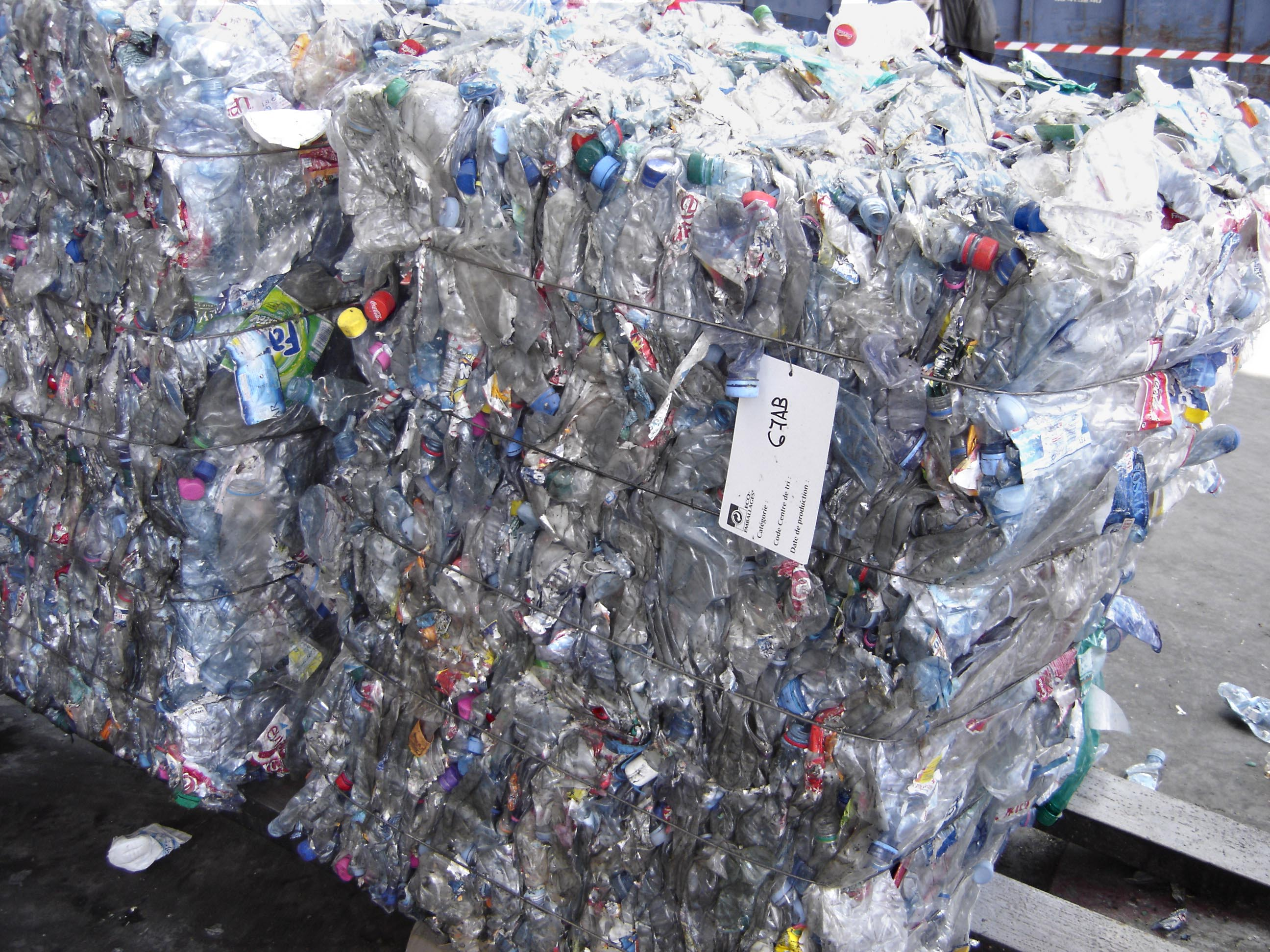 Balot de bouteille de plastique aprés tris des dechets